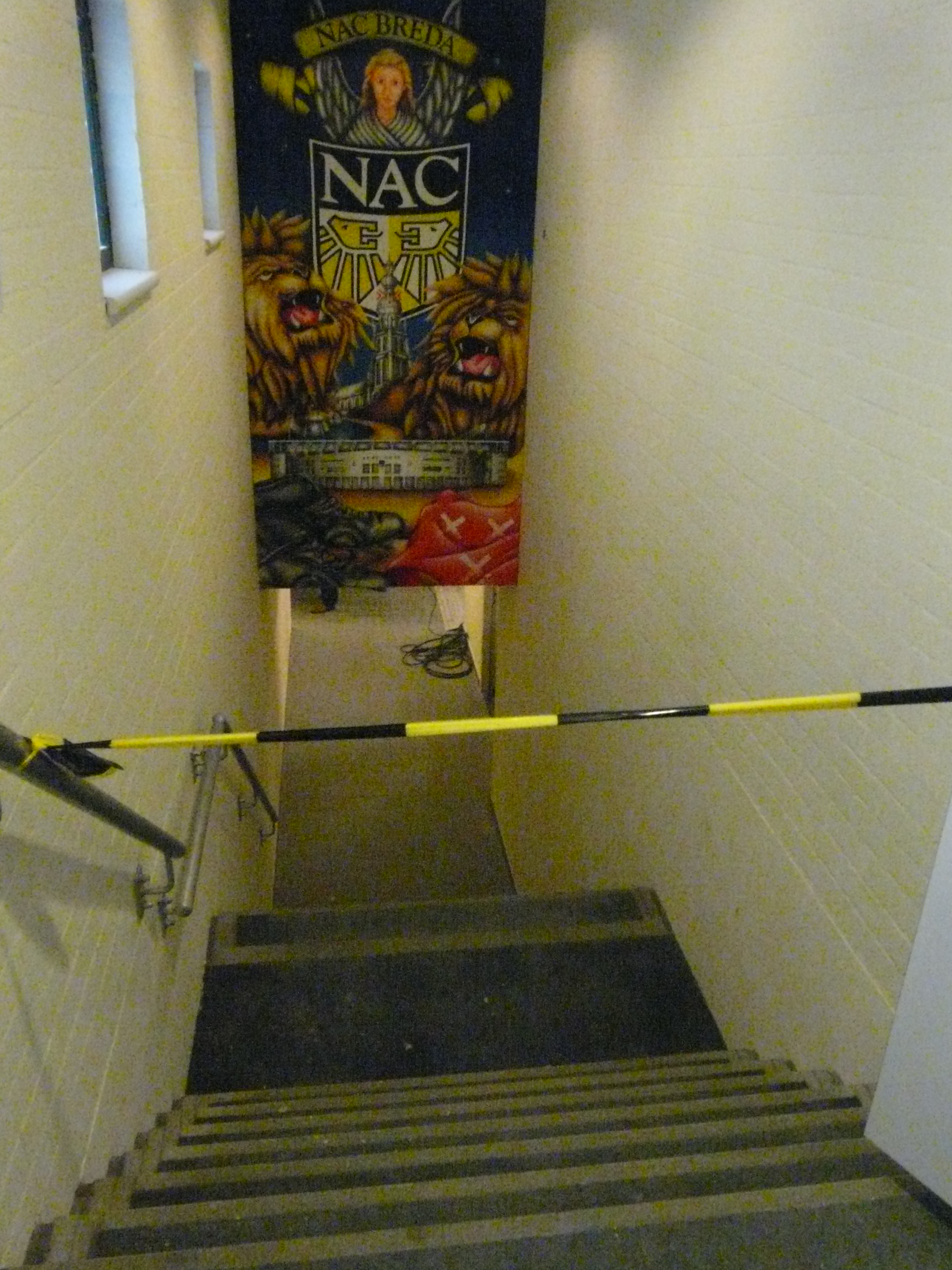 spelerstrap naar het NAC stadion